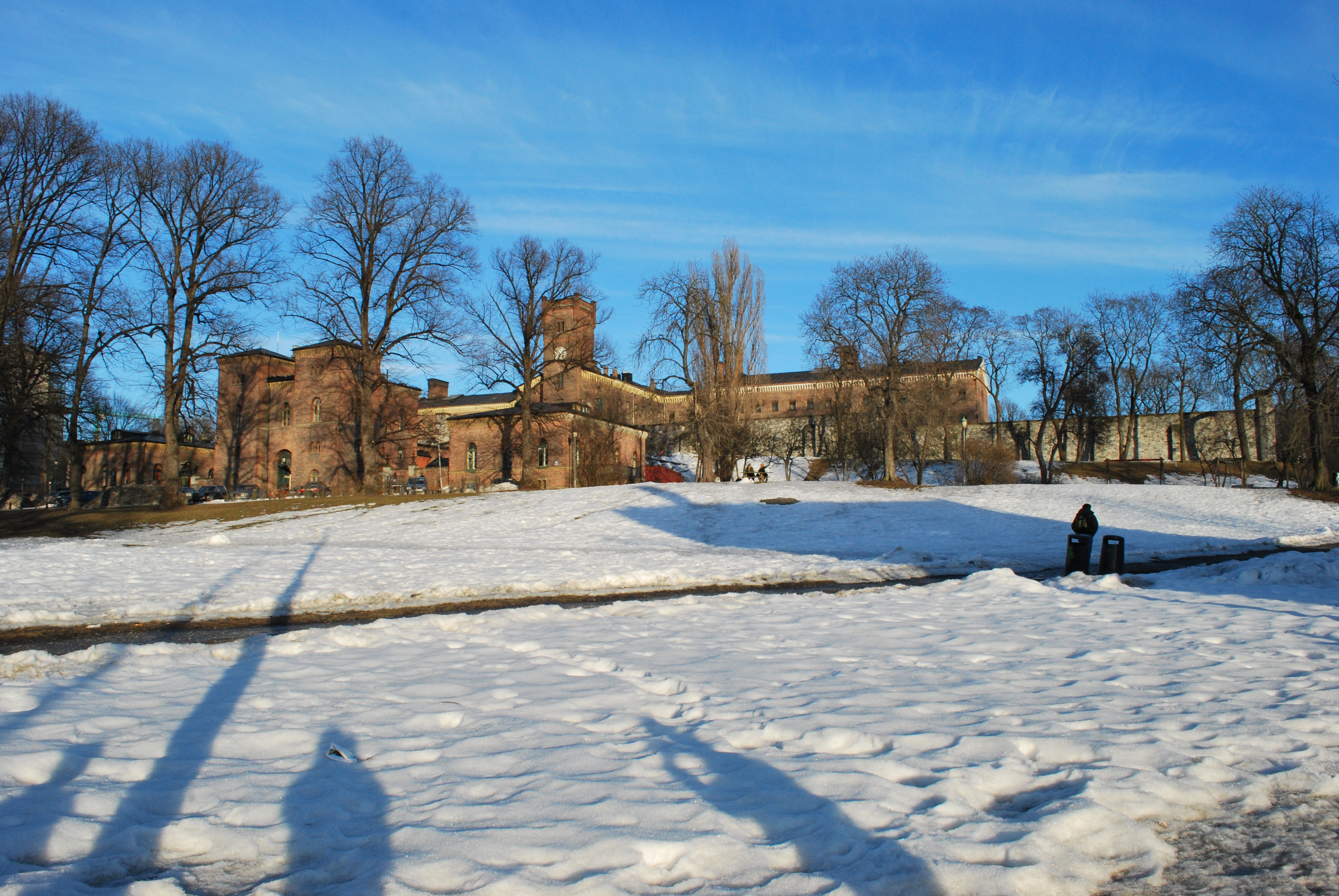 Botsfengslet, i dag Oslo fengsel, sett fra Grønlandsleiret / Grønlands park